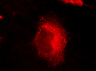 endosomes in cell